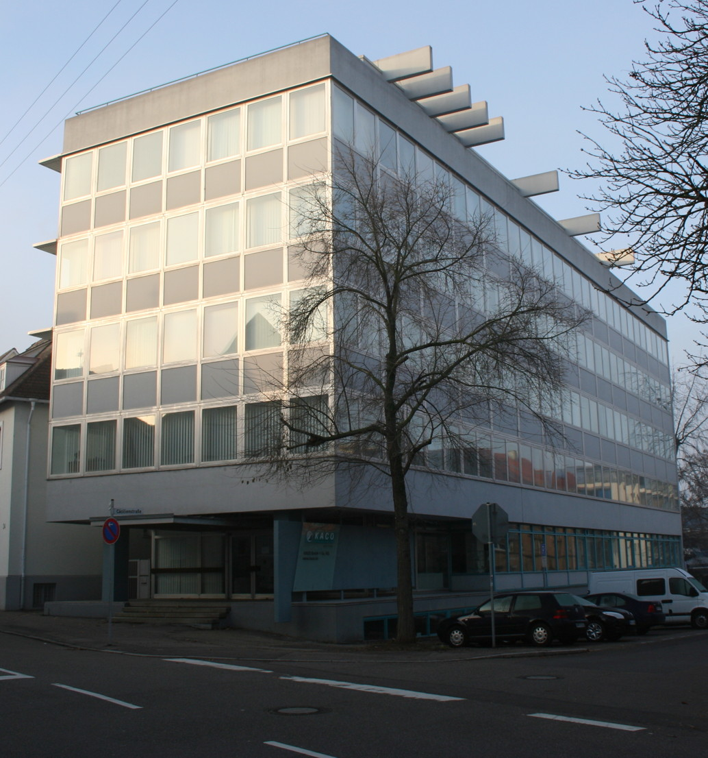 KACO headquarter, Rosenbergstraße 22, Heilbronn, Germany